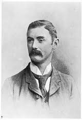 John Ball, Engels golfer